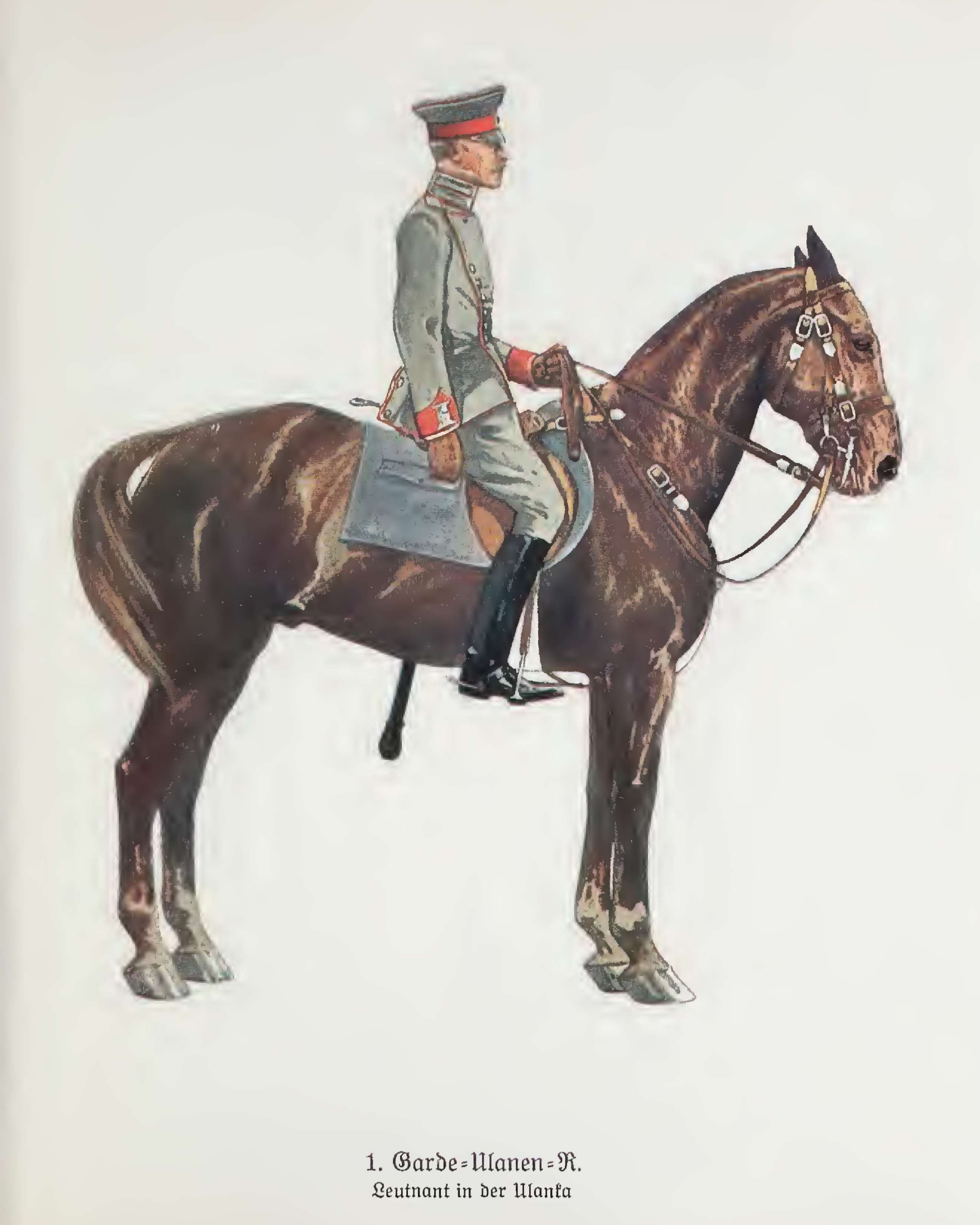 Reiter des 1. Garde-Ulanen-Regiments in feldgrauer Uniform, 1915